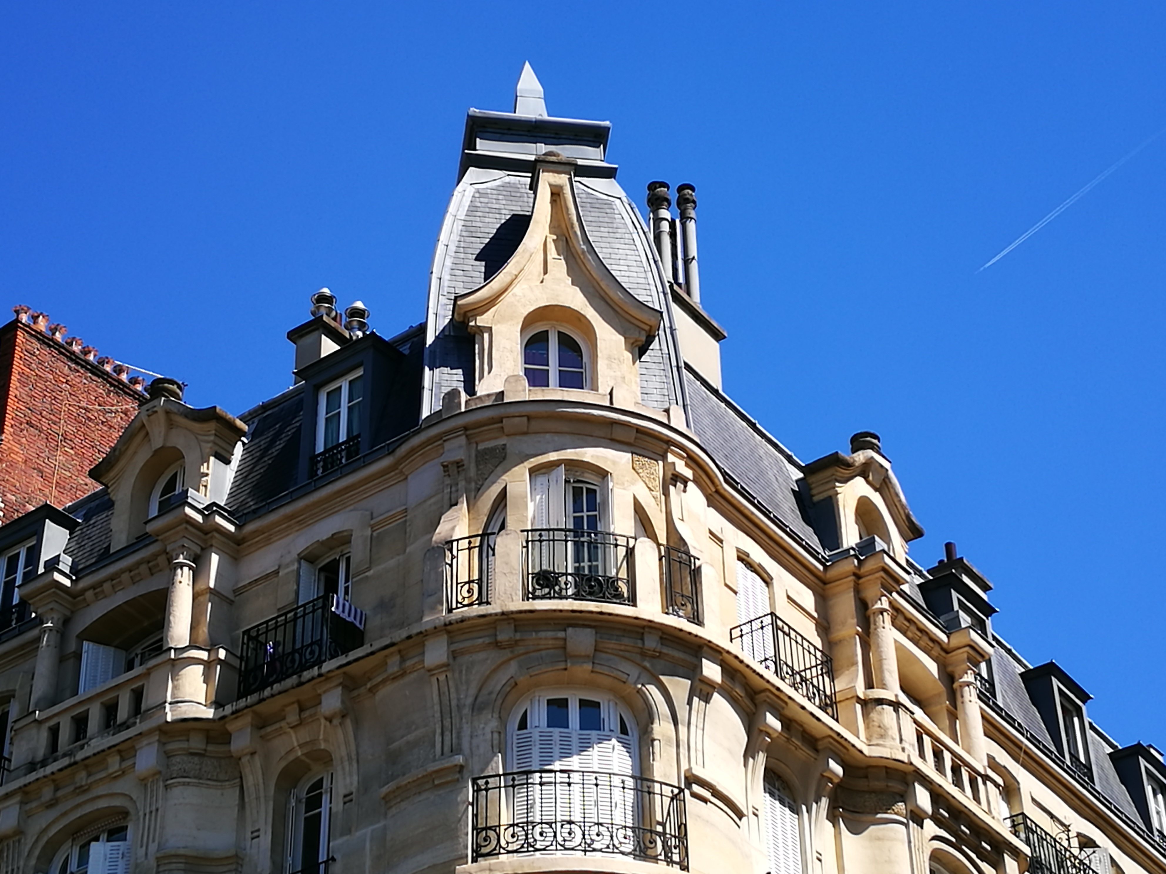 Façade - Clichy